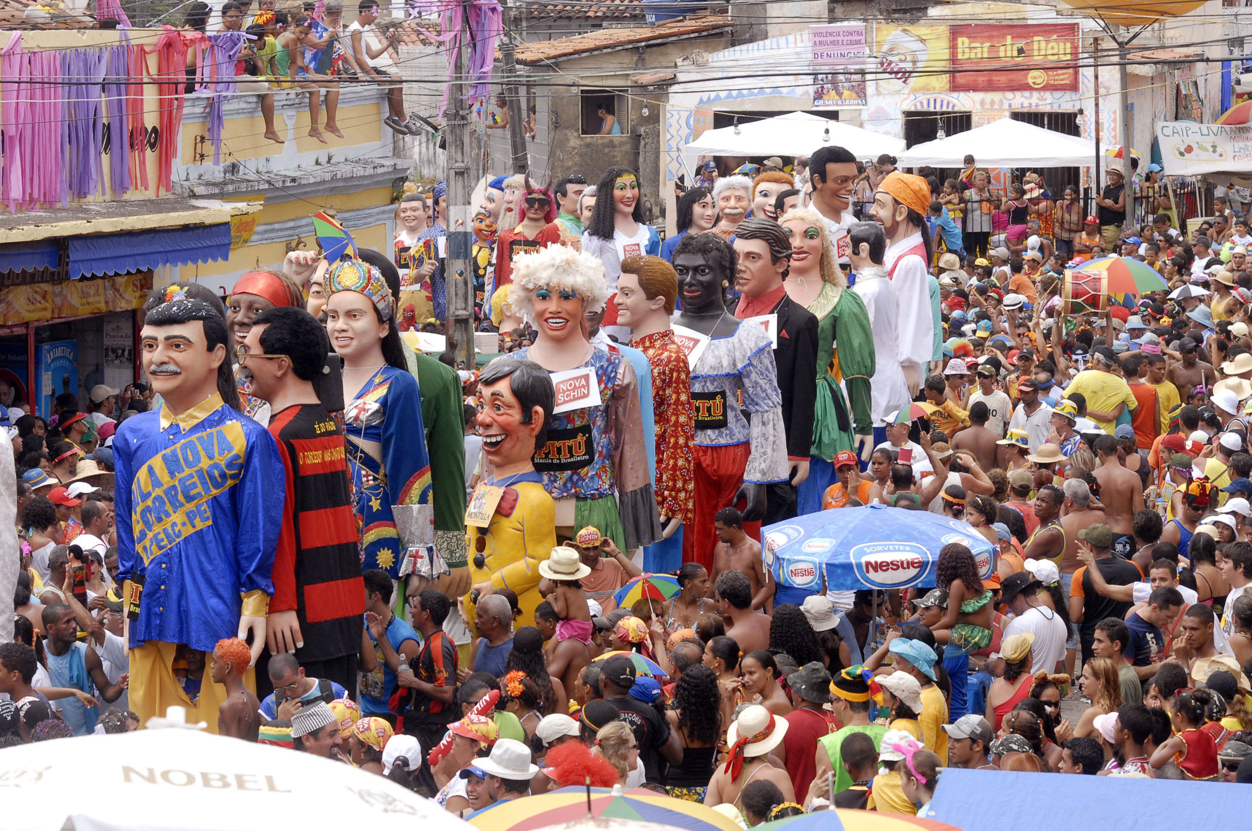 Bonecos gigantes, Carnaval do Olinda, Pernambuco, Brazil